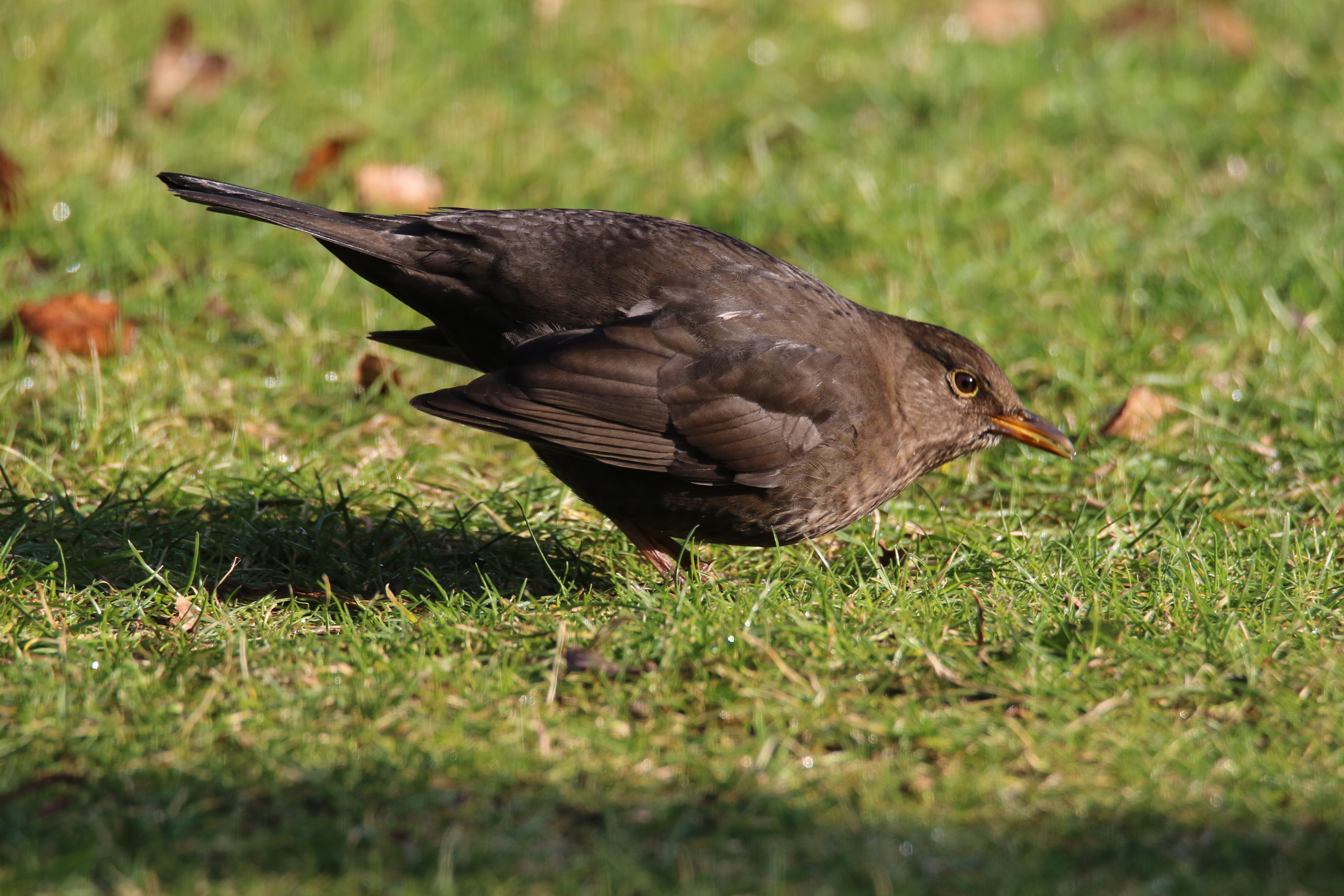 VrouwtjesMerel Op Zoek naar Voedsel in het gras, getrokken in België